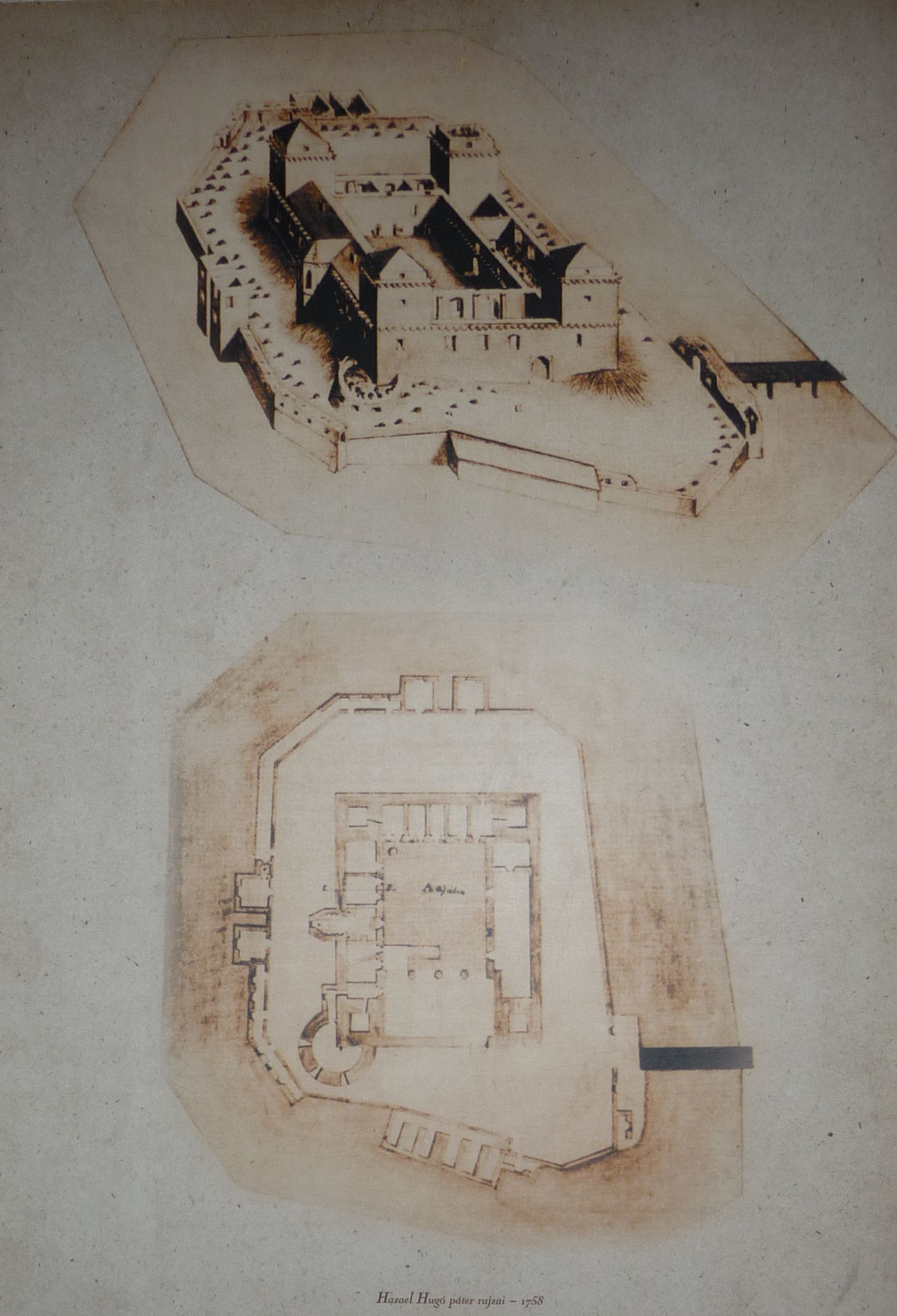 A diósgyőri vár Hazael Hugó páter rajzain (1758), Miskolc